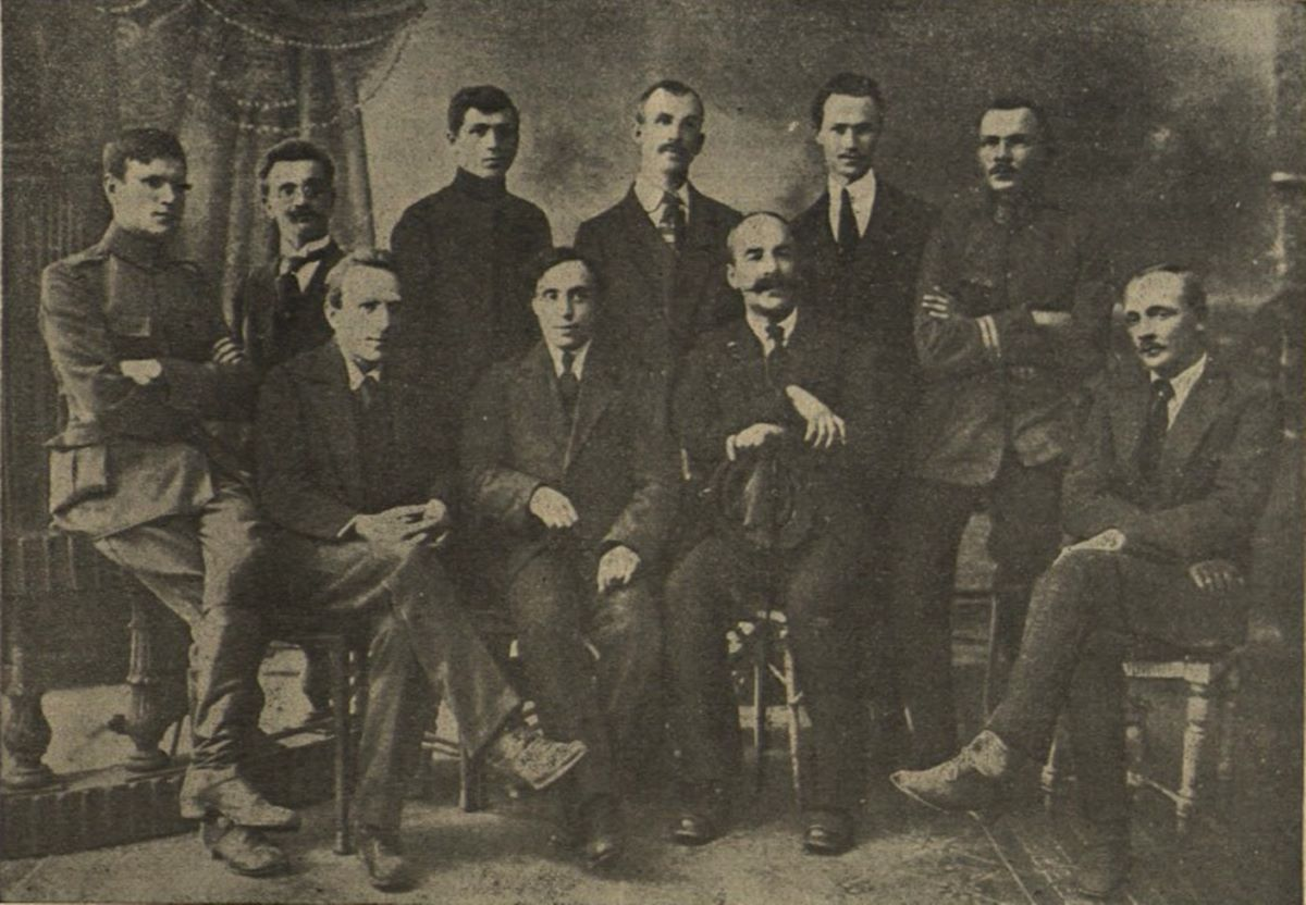 Беларуская (тарашкевіца): Група беларускіх пісьменьнікаў. Зьелва направа сядзяць: Макар Краўцоў, Францішак Аляхновіч, Зьмітрок Бядуля, Аляксандар Уласаў, Алесь Гарун, Янка Купала; стаяць: Альбэрт Паўловіч, Міхась Чарот, Уладзіслаў Галубок, Язэп Фарботка